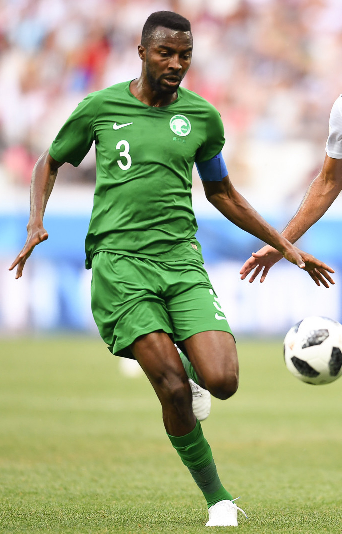 Египет с Салахом проиграл Саудовской Аравии